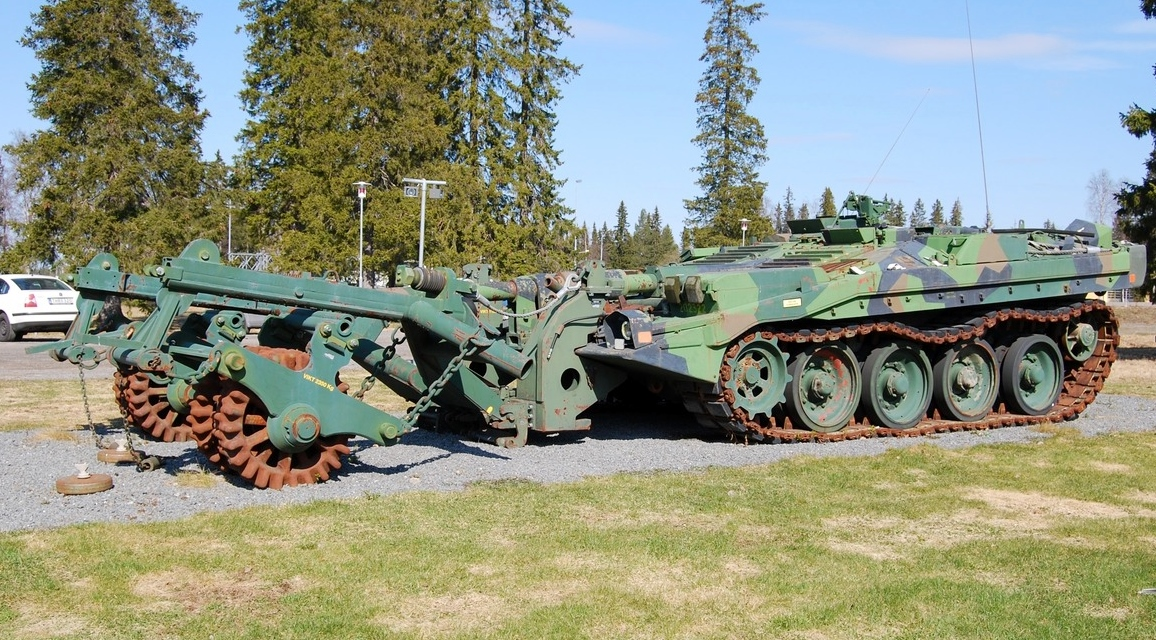 Minvältsaggregat till Stridsvagn 103 C. Minvältsaggregat hade till uppgift att röja minor så att det blev farbar och säker väg för efterkommande stridsvagnar. Detta minvältsaggregat har tillverkningsnummer 32, och materielnummer M4990-501139. Stridsvagnen har milregnr 202322.